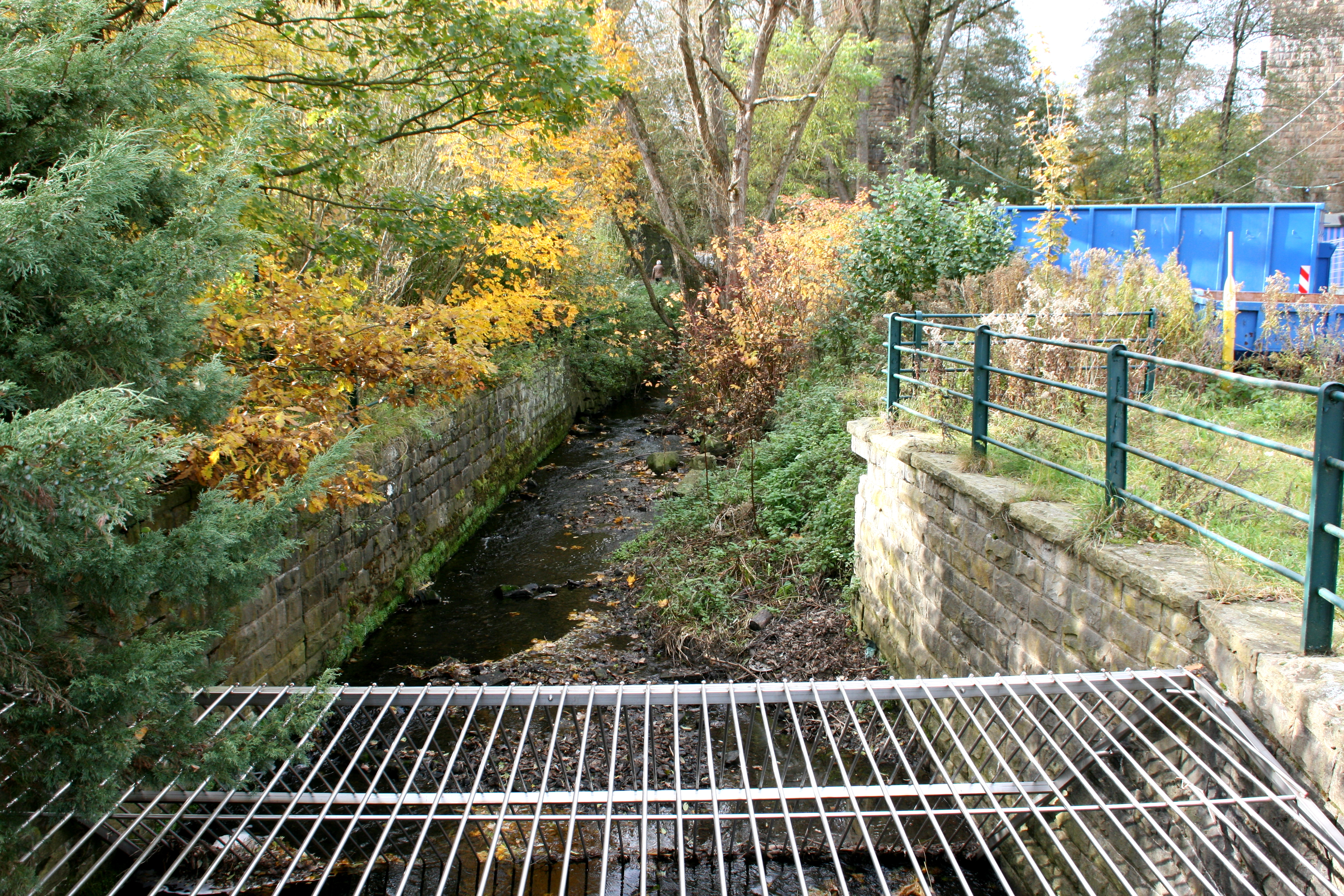 Stefansbach an der Nelkenstraße in Gevelsberg